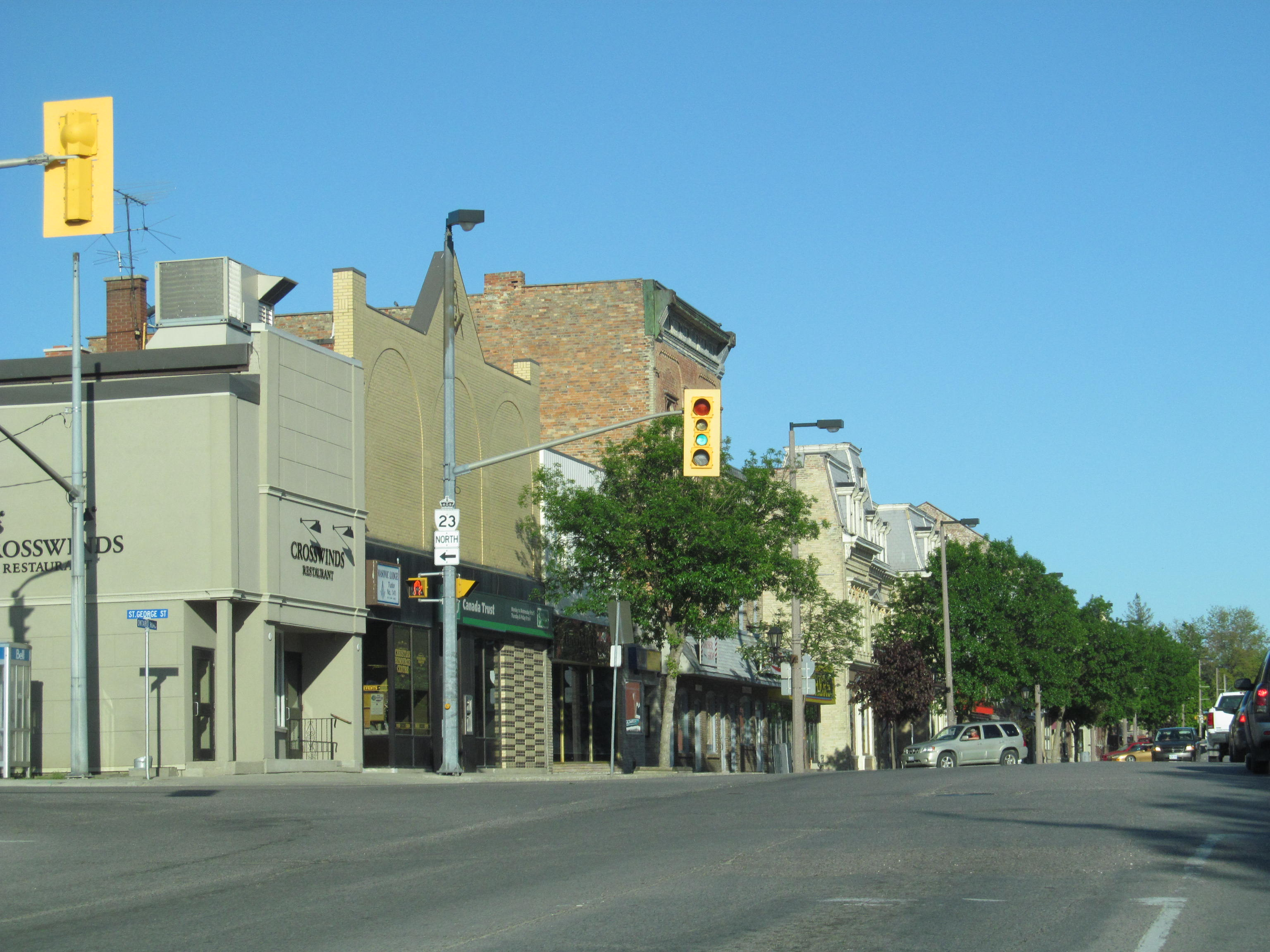 Mitchell, Ontario, Canada.